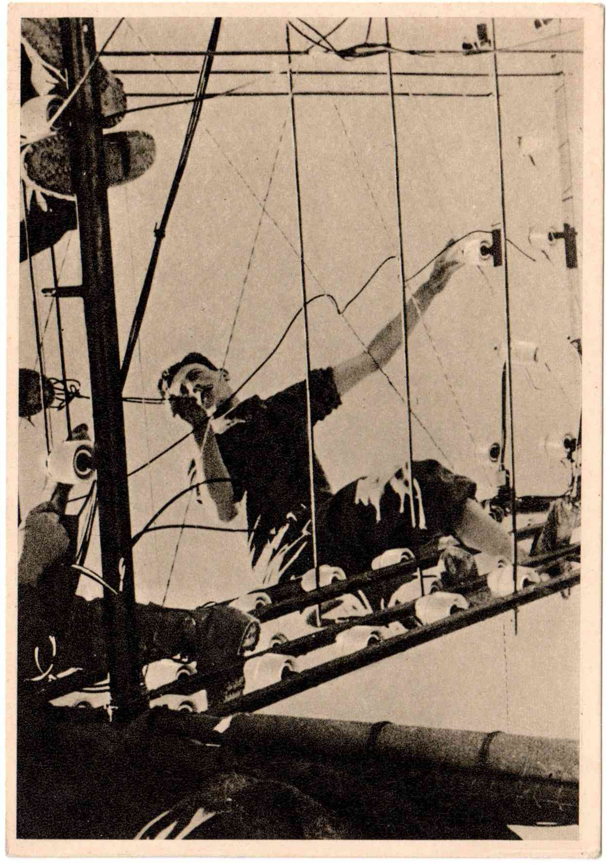 Serie:Visioni della conquista dell’Impero – Genio Telegrafisti al lavoro